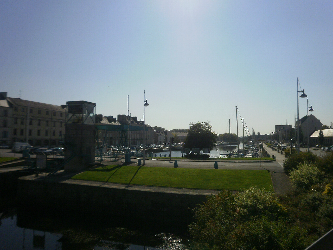 Port de plaisance de Redon